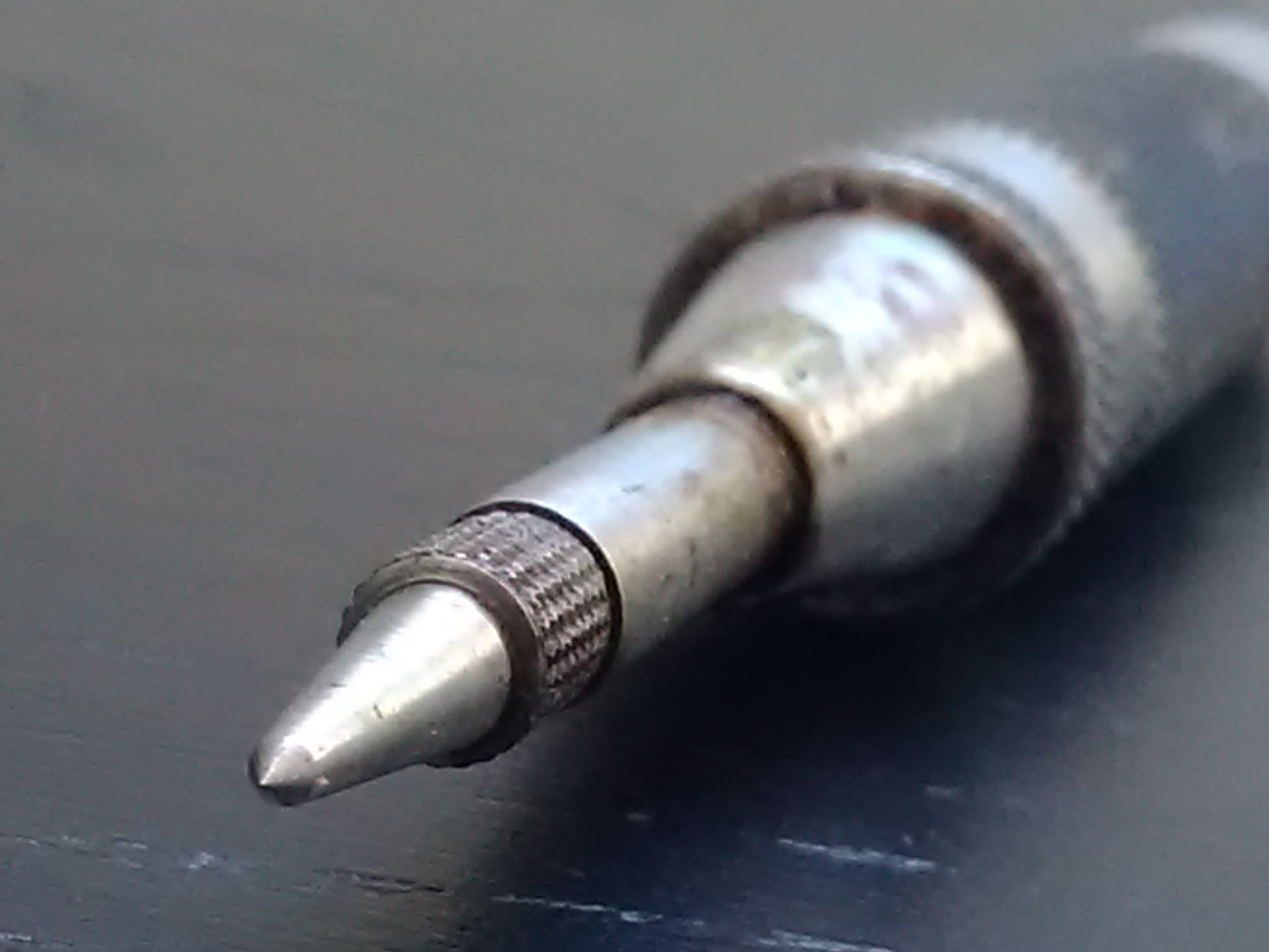 Armando Gorosabel Amuategi grabatzaile eibartarraren puntzoiaren puntaren detailea.